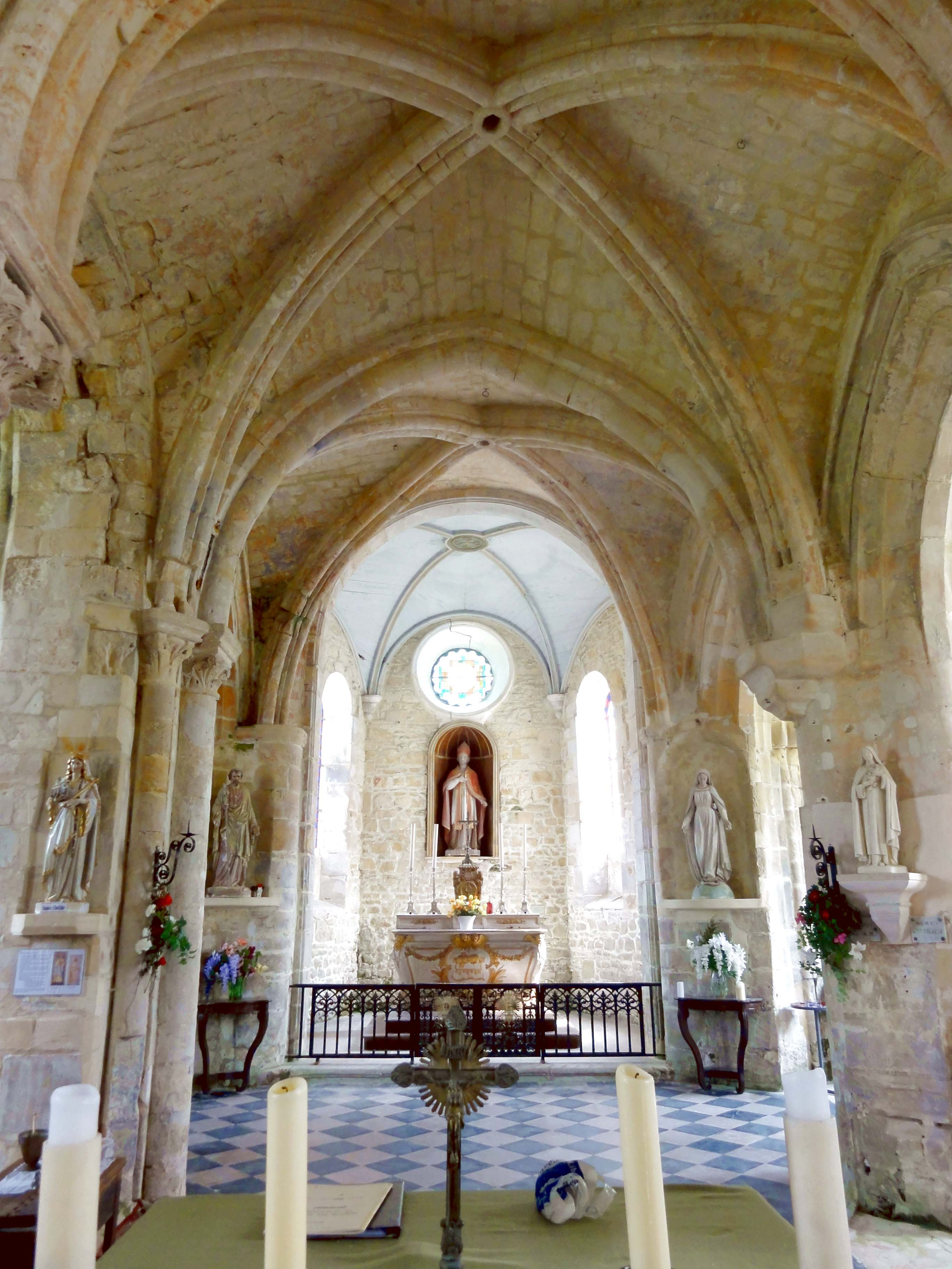 Intérieur de l'église - voir titre.